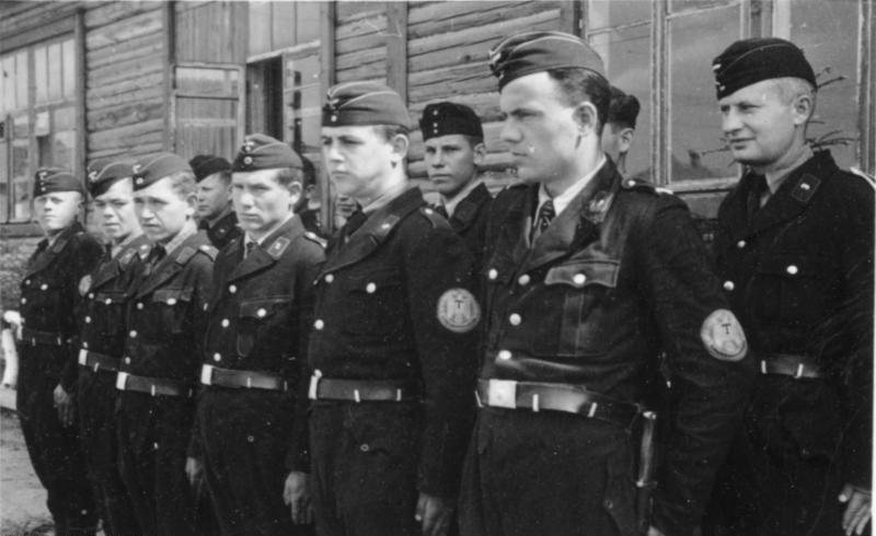 Die ukrainische Wachmannschaft des Torfwerkes, Juni 1943 Einsatzstab Reichsleiter Rosenberg für die besetzten Gebiete - Hauptarbeitsgruppe Ostland Film: 90/32